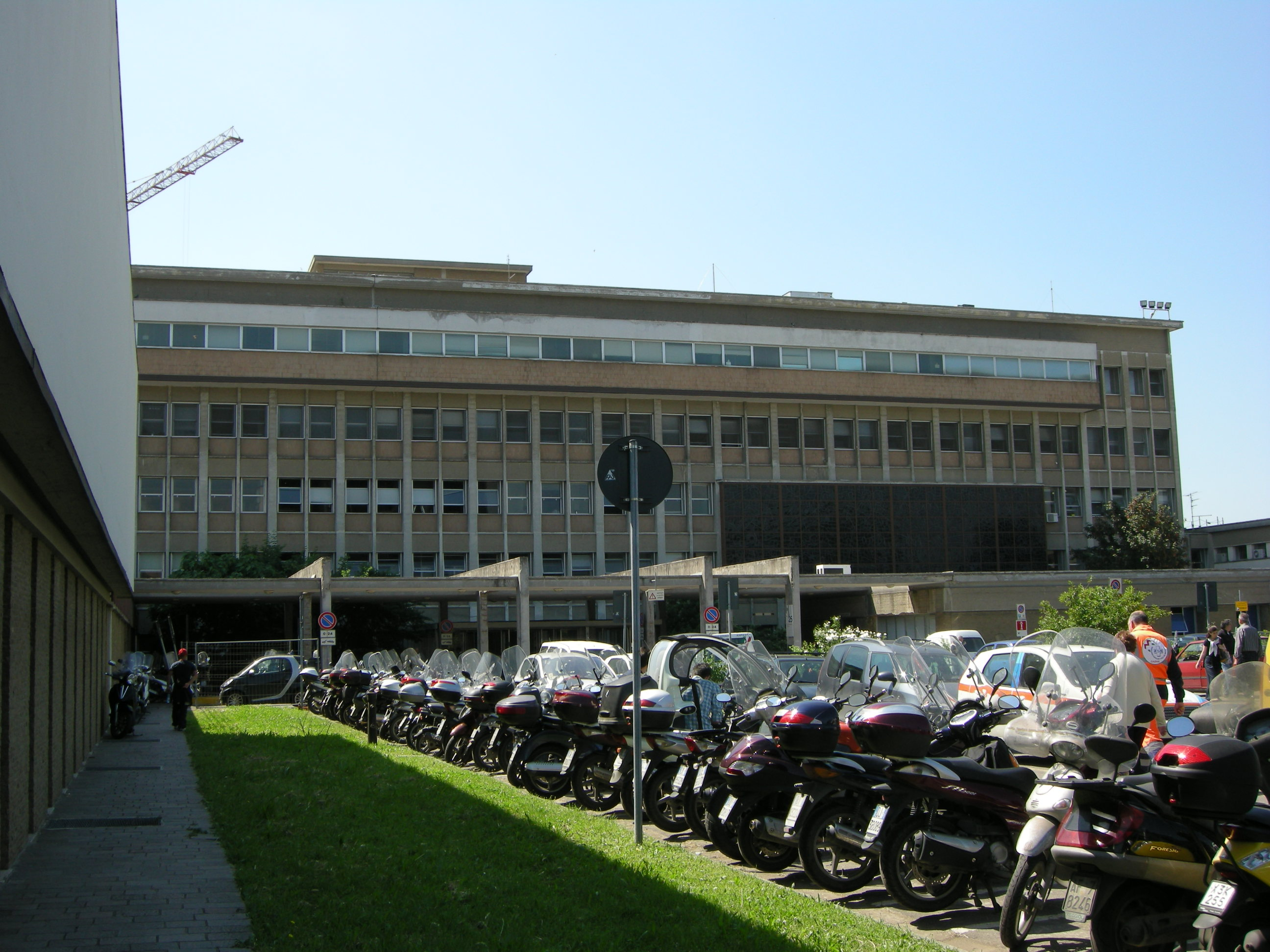 Firenze